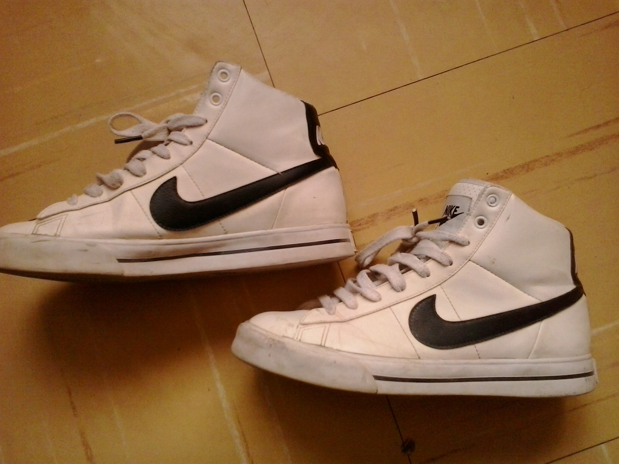 estilo mas vendido de nike